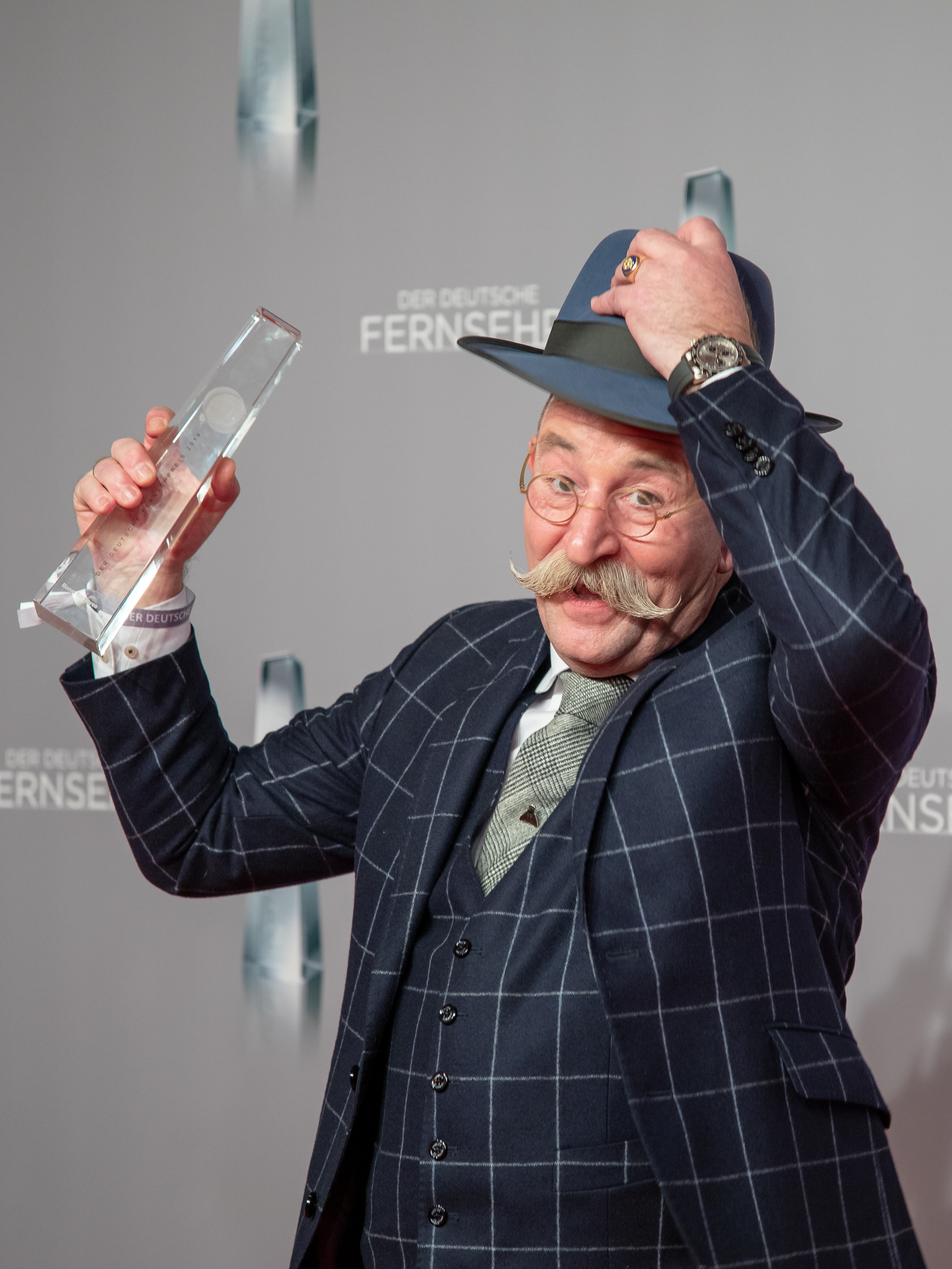 Horst Lichter beim Deutschen Fernsehpreis 2019 in der Düsseldorfer Rheinterrasse